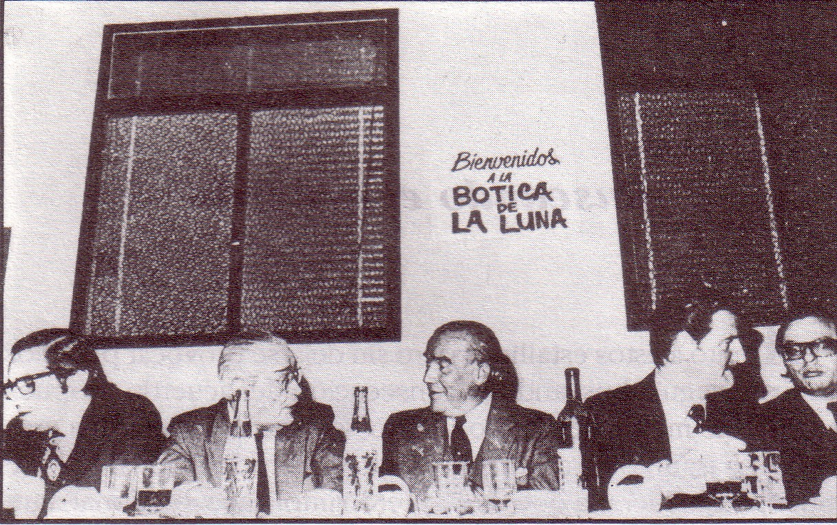 La Hora del Pueblo. Ricardo Balbín, Horacio Thedy, Daniel Paladino, entre otros.